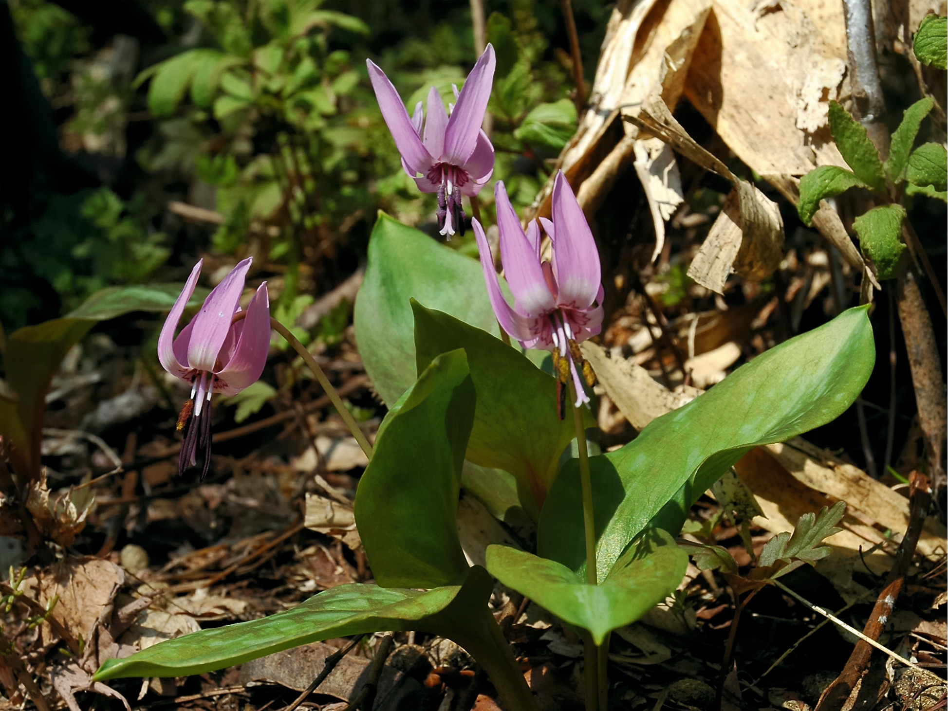 Erythronium japonicum (Katakuri, カタクリ)